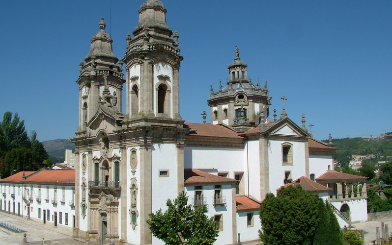 Das zweite, ursprünglich im frühen 12. Jh. entstandene Kloster Mosteiro de São Miguel de Refojos de Basto.